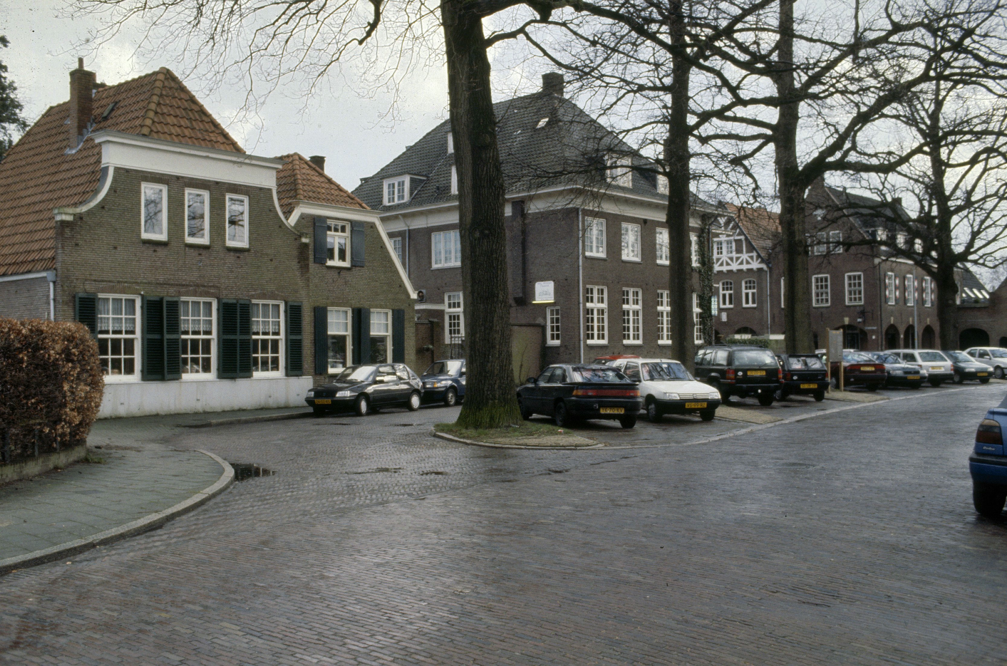 Tuindorp Het Lansink: C.T. Storkplein met Hotel 't Lansink